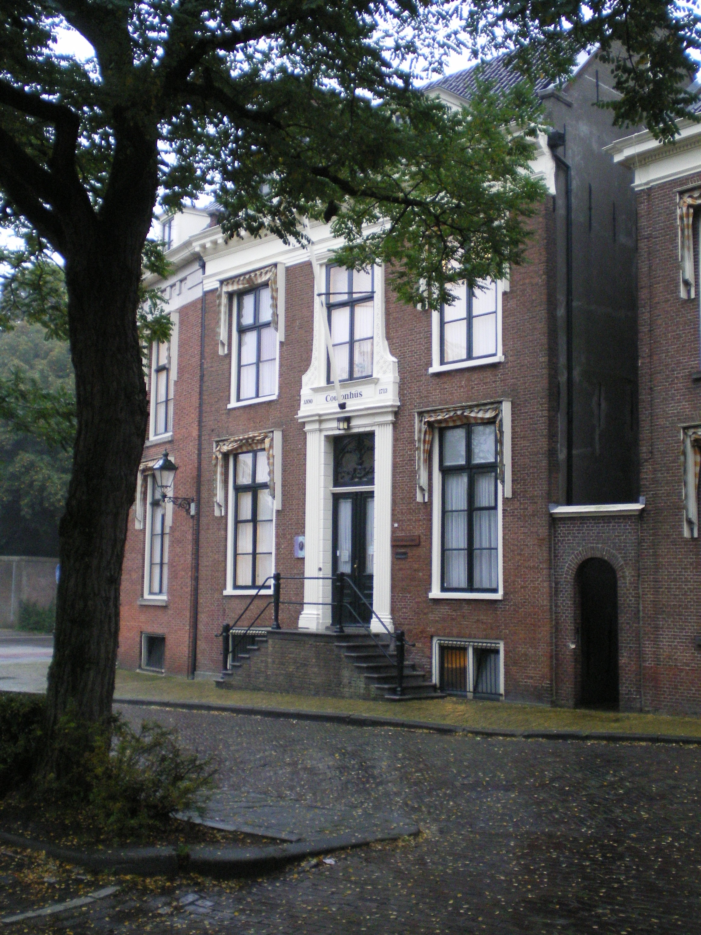 Coulonhûs, hoofdgebouw van de Fryske Akademy in de Doelestraat in Leeuwarden.